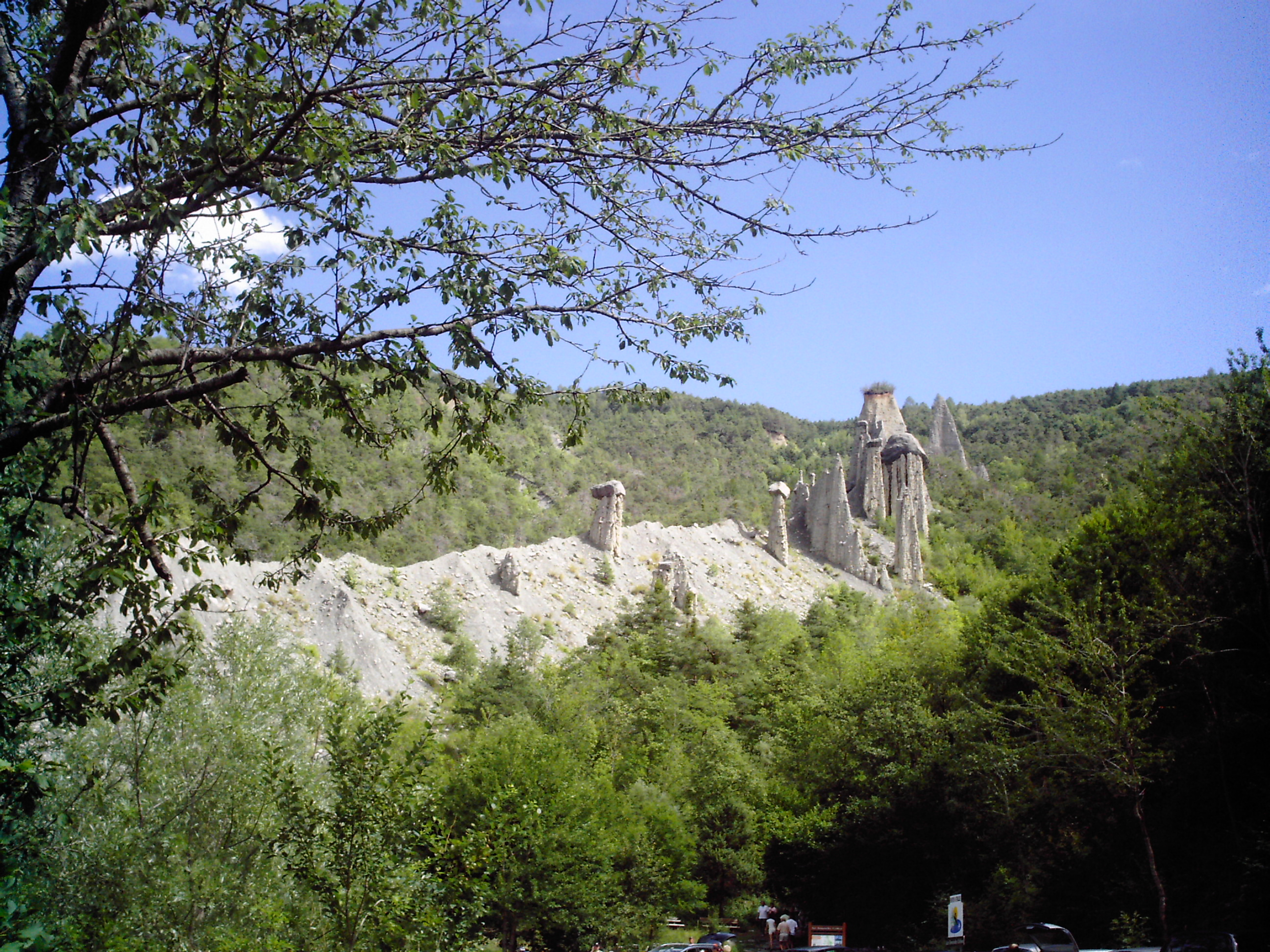 Demoiselles coiffées de Pontis, commune des Alpes-de-Haute-Provence située près du lac de Serre-Ponçon.